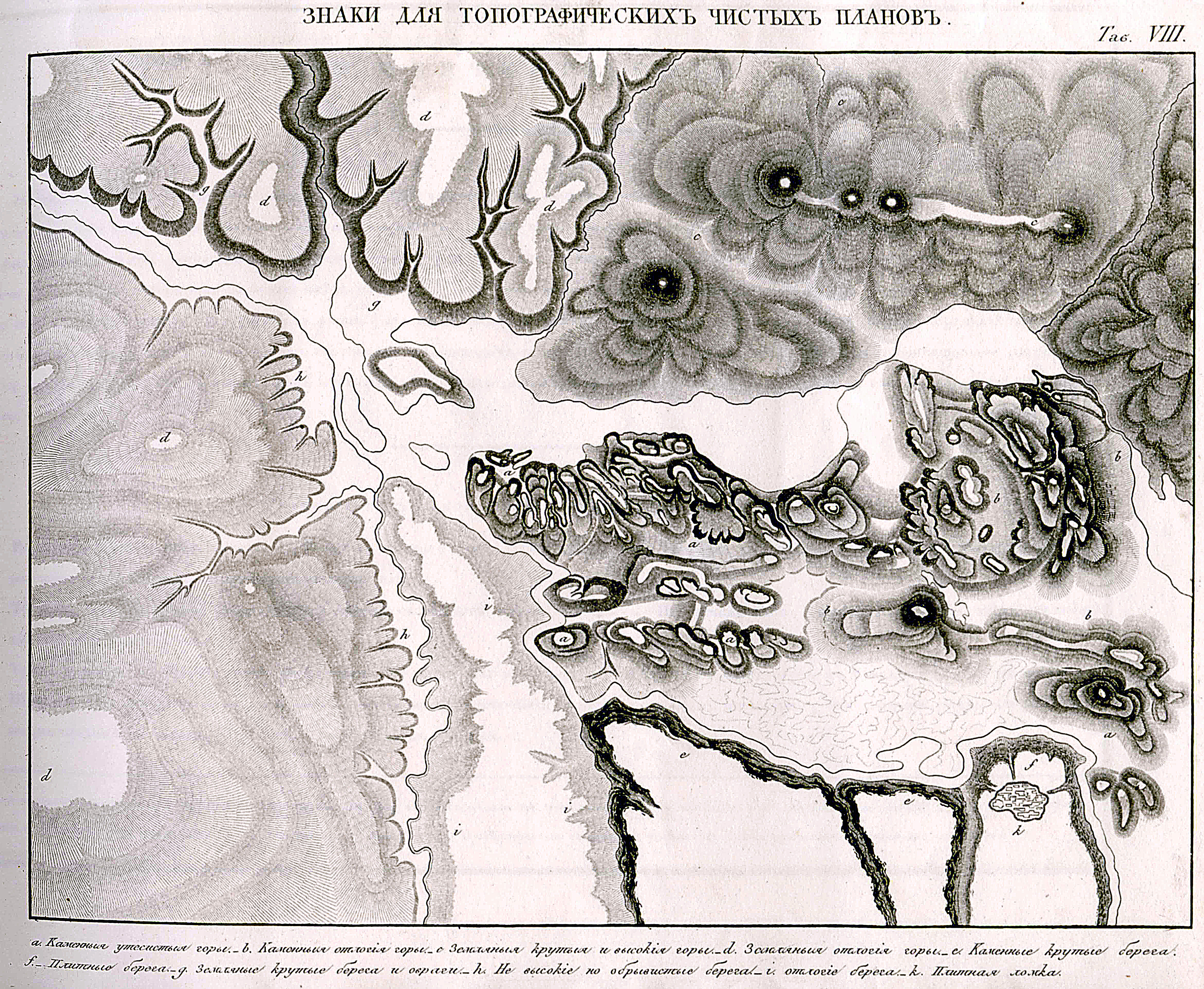 Условные знаки для употребления на Топографических, Географических и Квартирных Картах и Военных Планах. Составлены при Канцелярии Генерал-Квартирмейстера Главнаго Штаба Его Императорского Величества. Утверждены Начальником Главнаго Штаба Его Императорскаго Величества 6-го дня 1822 г Условные знаки для употребления на Топографических, Географических и Квартирных Картах и Военных Планах. Составлены при Канцелярии Генерал-Квартирмейстера Главнаго Штаба Его Императорского Величества. Утверждены Начальником Главнаго Штаба Его Императорскаго Величества 6-го дня 1822 г.